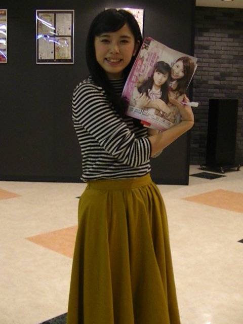 河邑ミク (2018年11月)